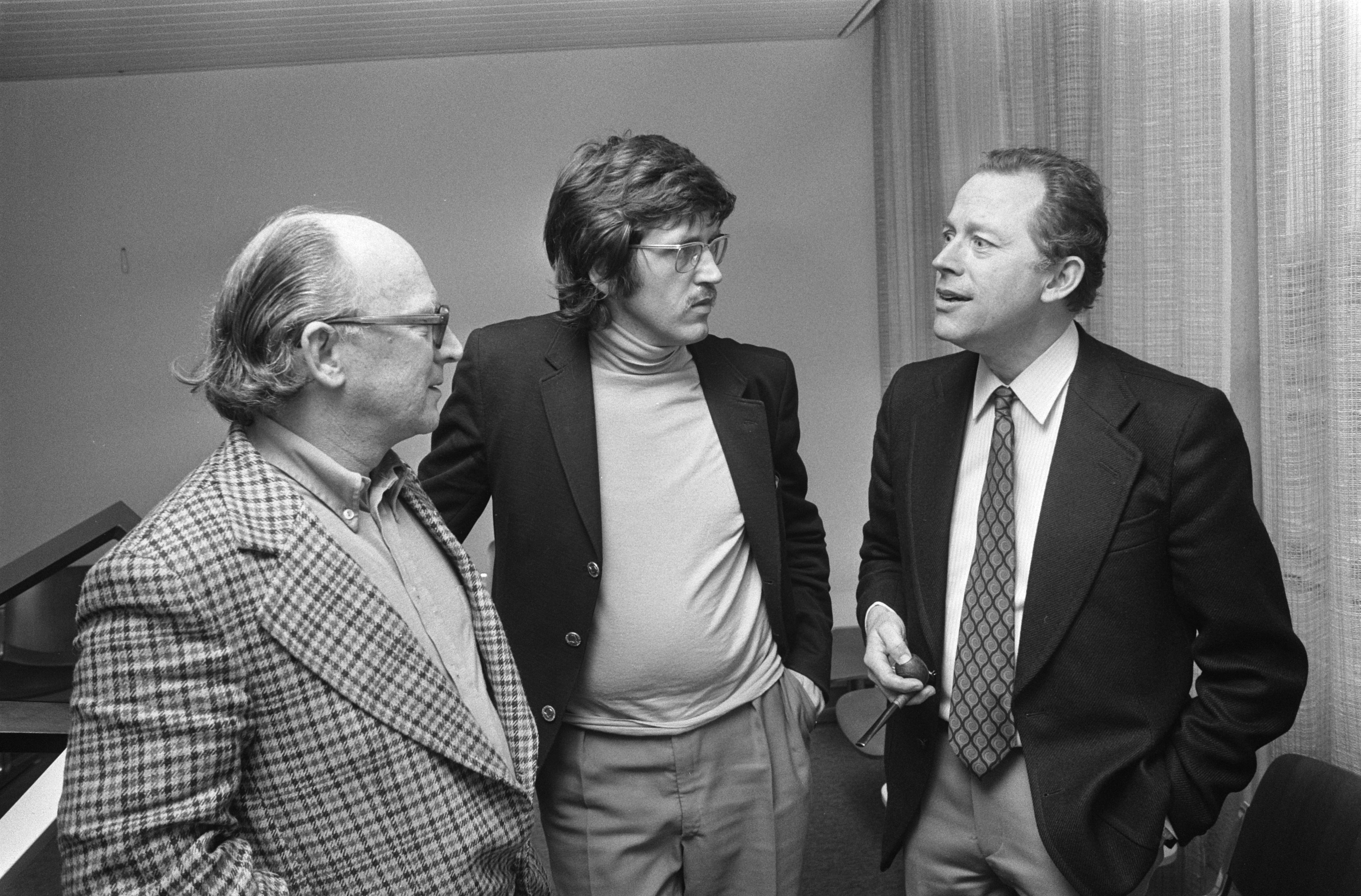 Collectie / Archief : Fotocollectie Anefo Reportage / Serie : [ onbekend ] Beschrijving : Vertegenwoordigers van de werkgroep Bestuur Nieuw Dennendal bij het ministerie van Volksgezondheid; v.l.n.r. Piet Reckman, Bram Peper en prof. Loek Hulsman Datum : 11 februari 1974 Locatie : Den Haag, Zuid-Holland Trefwoorden : klinieken, verstandelijk gehandicapten Persoonsnaam : Hulsman, Loek, Peper, Bram, Reckman, Piet Fotograaf : Verhoeff, Bert / Anefo Auteursrechthebbende : Nationaal Archief Materiaalsoort : Negatief (zwart/wit) Nummer archiefinventaris : bekijk toegang 2.24.01.05 Bestanddeelnummer : 926-9956